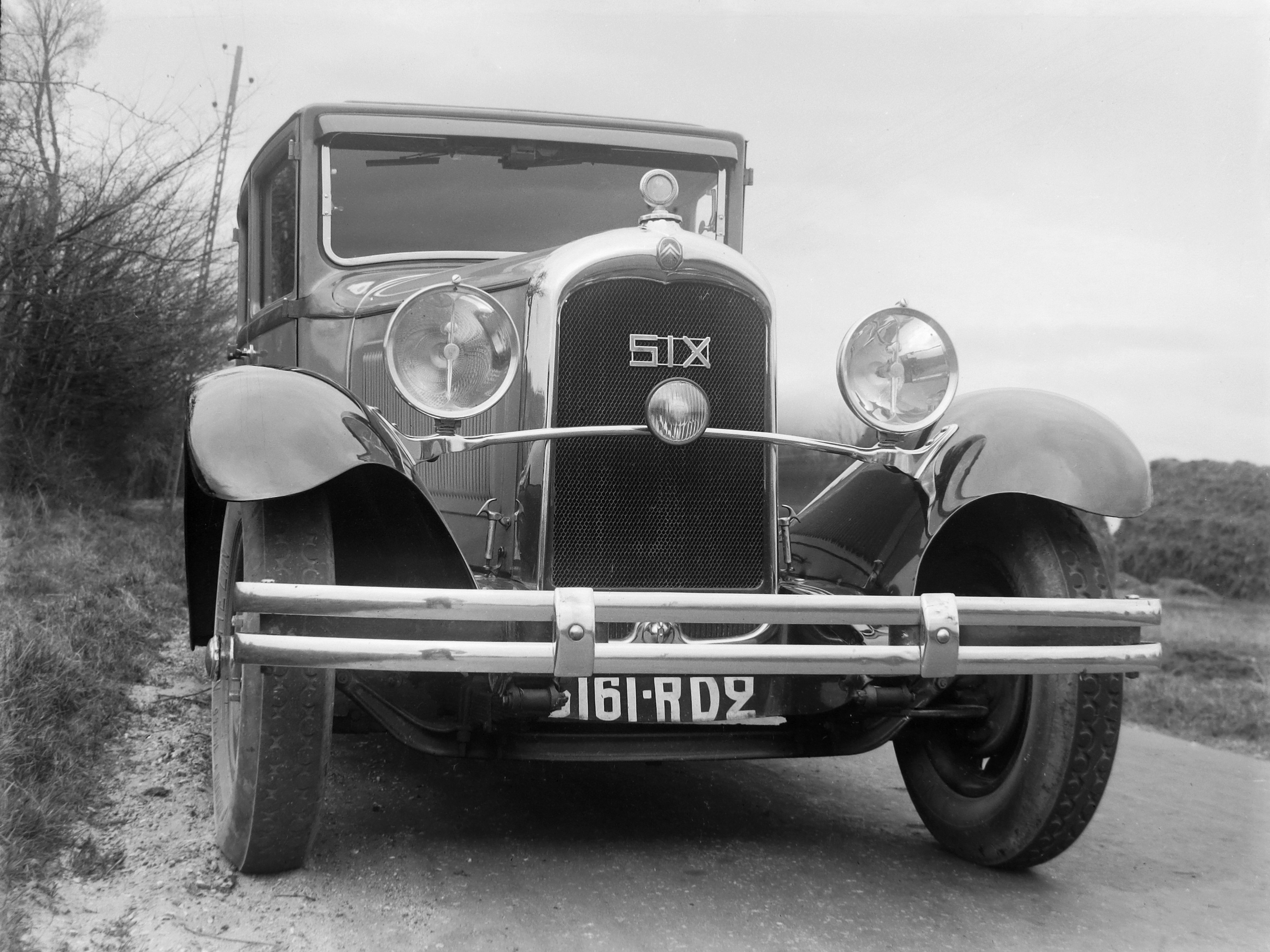 Citroën six